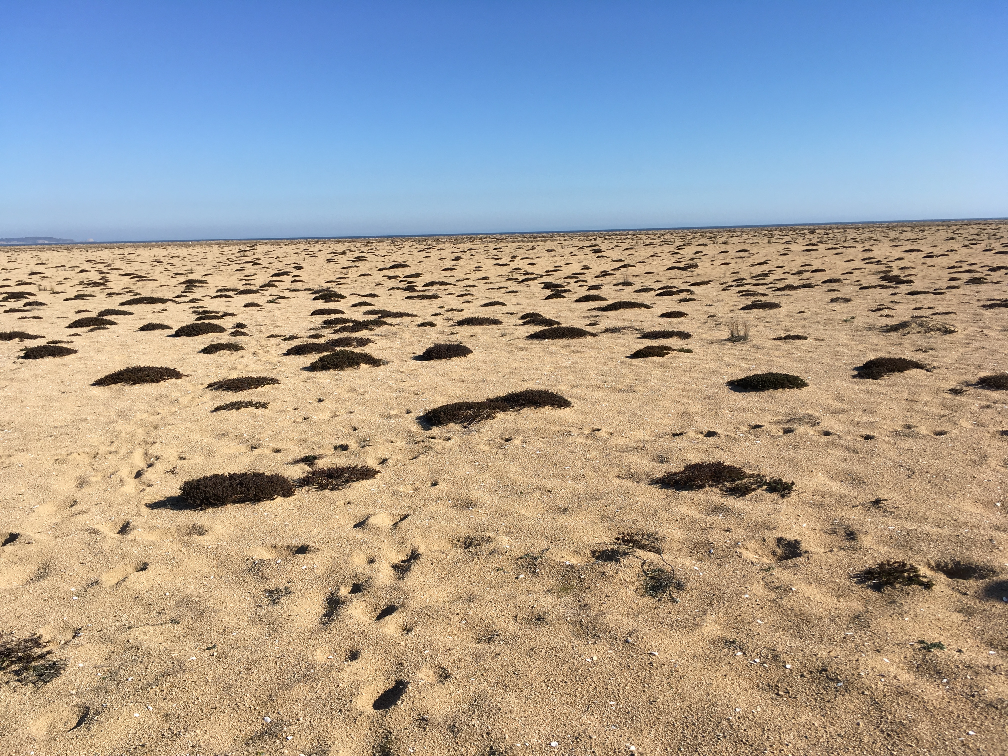 Poblaciones de Chorizanthe vaginata en playa desembocadura del estero Casablanca